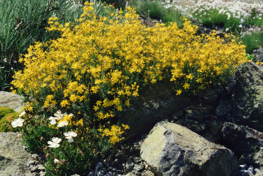 Hypericum empetrifolium subsp. empetrifolium (det. user:RLJ)